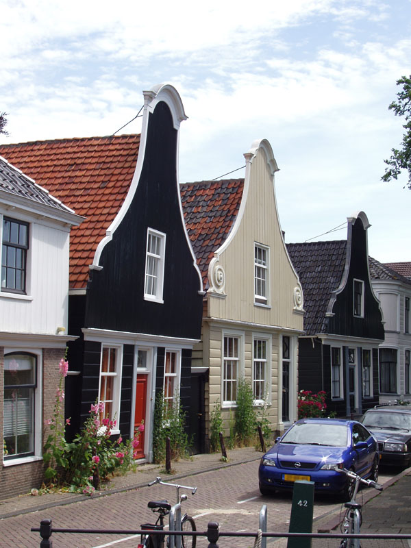 Houten huizen met klokgevels aan de haven van Nieuwendam (Amsterdam)